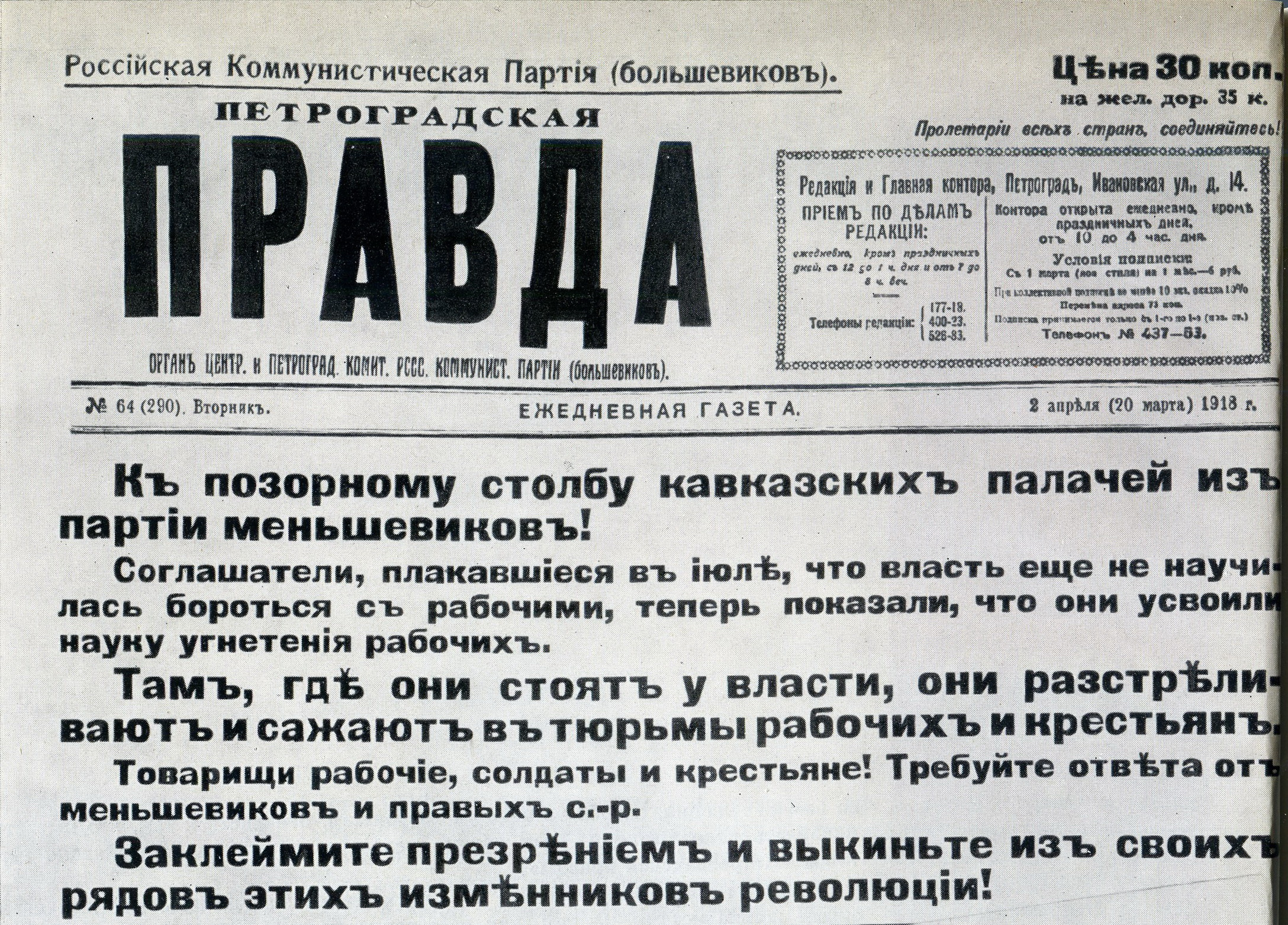 Скан части первой страницы газеты "Петроградская правда" от 20 марта ст. ст. / 2 апреля н. ст. 1918 года, №64 (290).